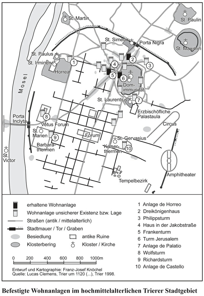 Karte der befestigten Wohnanlagen im hochmittelalterlichen Trierer Stadtgebiet